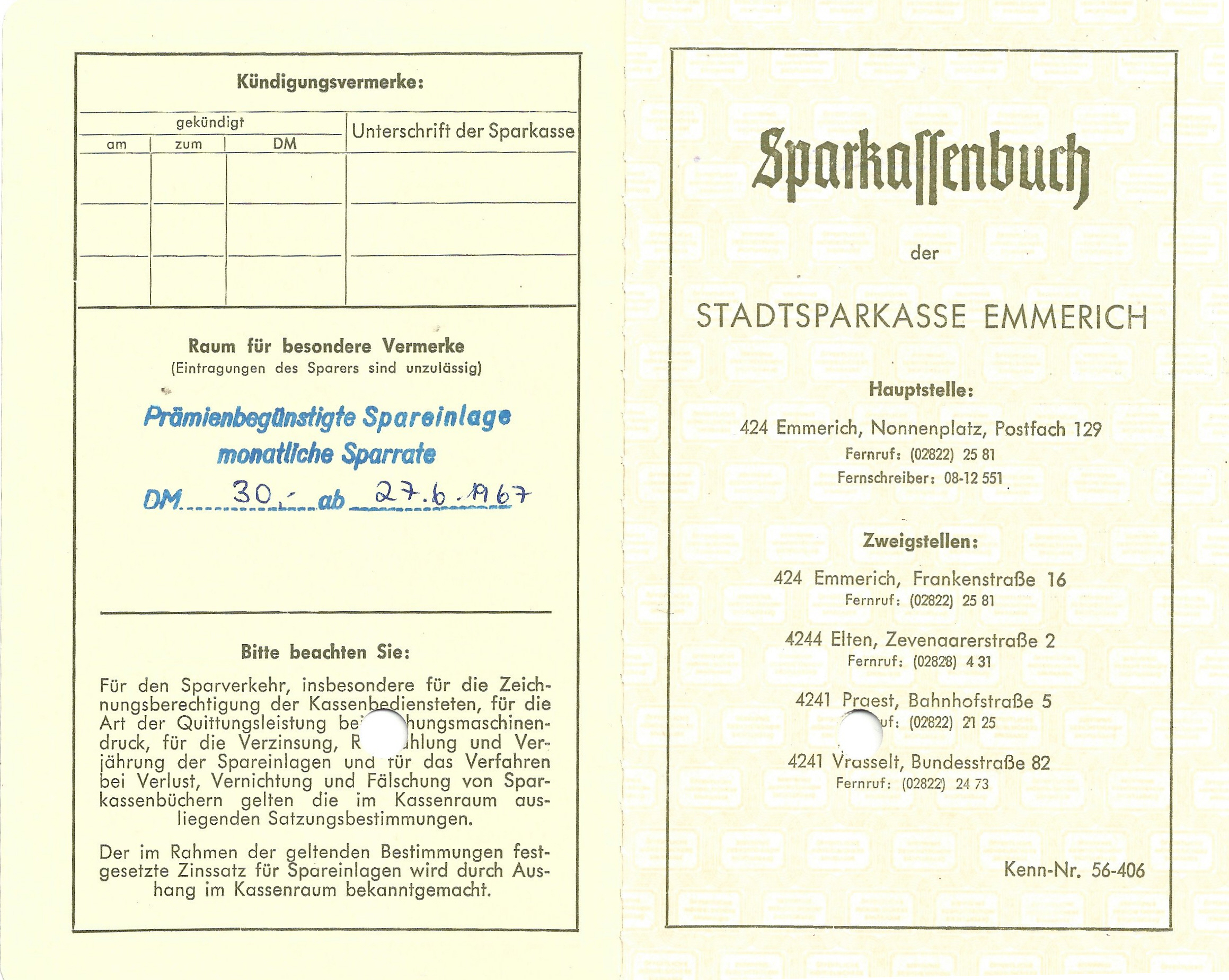 Stadtsparkasse Emmerich - Sparbuch 1967 - Vermerk prämienbegünstige Spareinlage